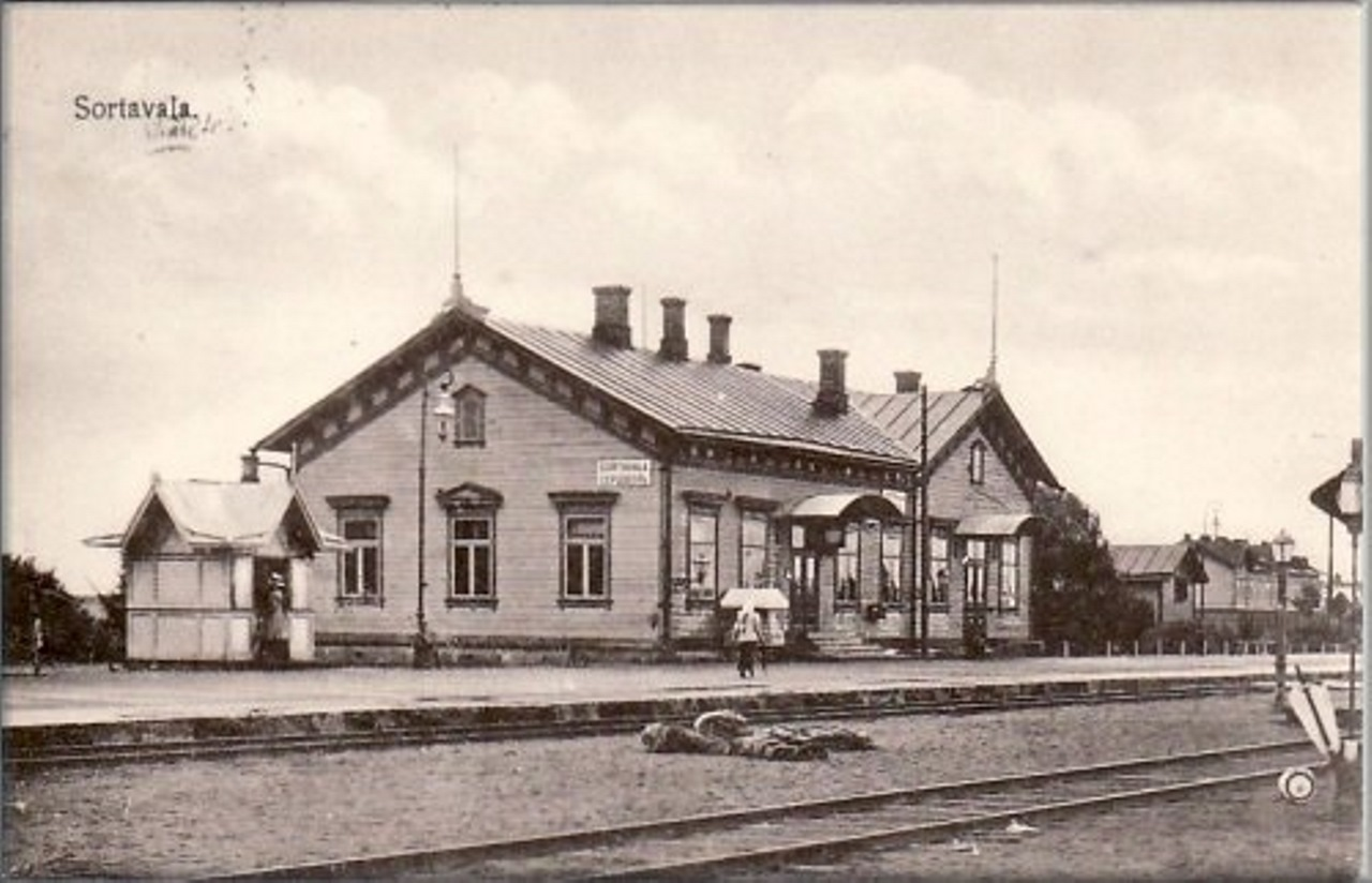 Сортавала.